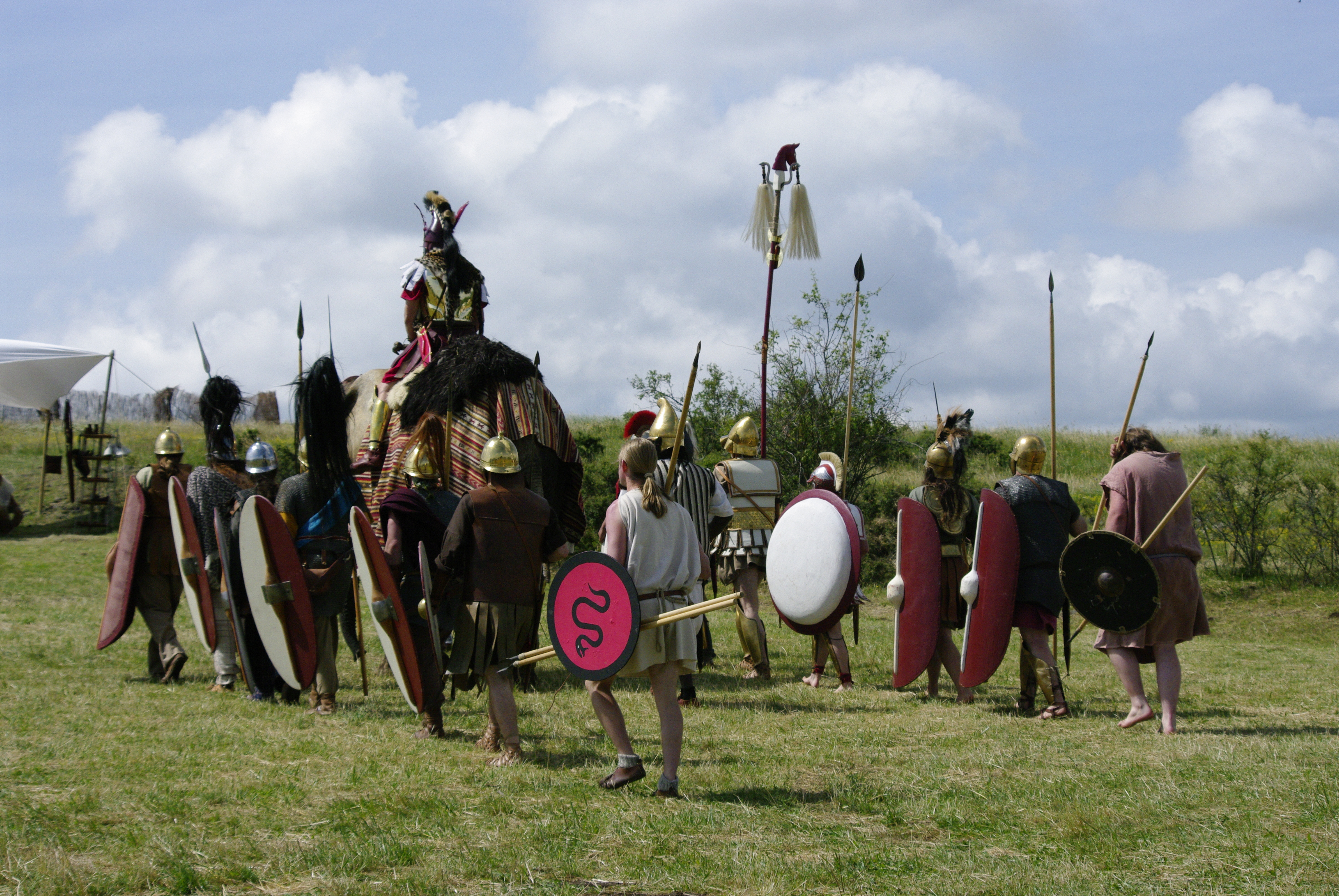 Défilé des troupes carthaginoises. Photographie réalisée le 22 juillet 2012 sur le plateau de Gergovie lors des Arverniales.